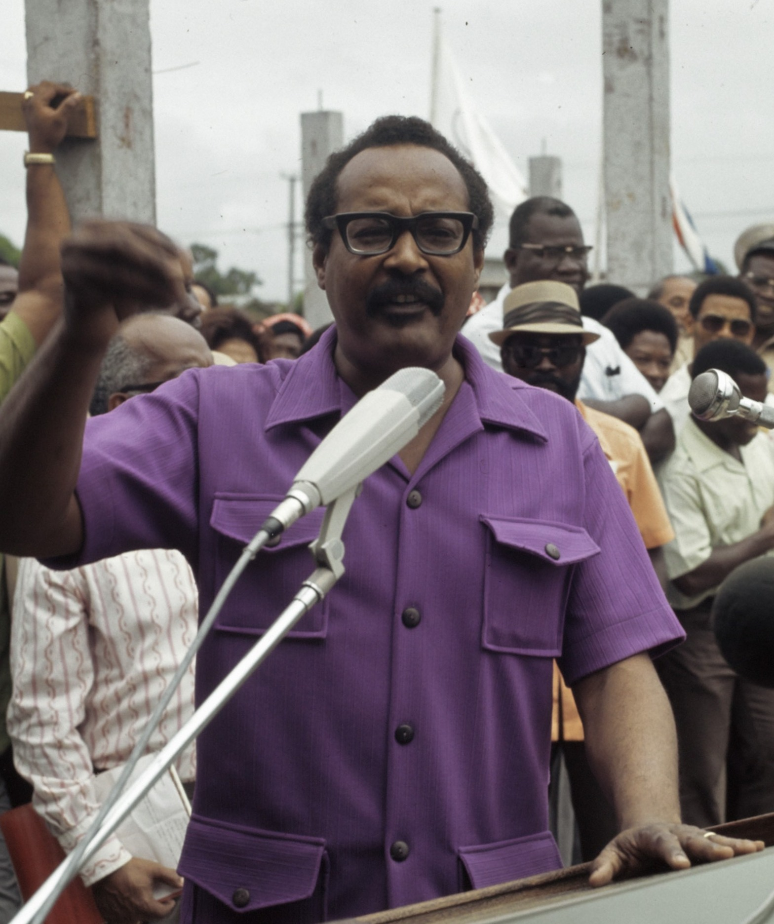 Suriname (straatbeelden, industrie, politiek, mensen etc. politiek: Arron spreekt volk toe, koppen